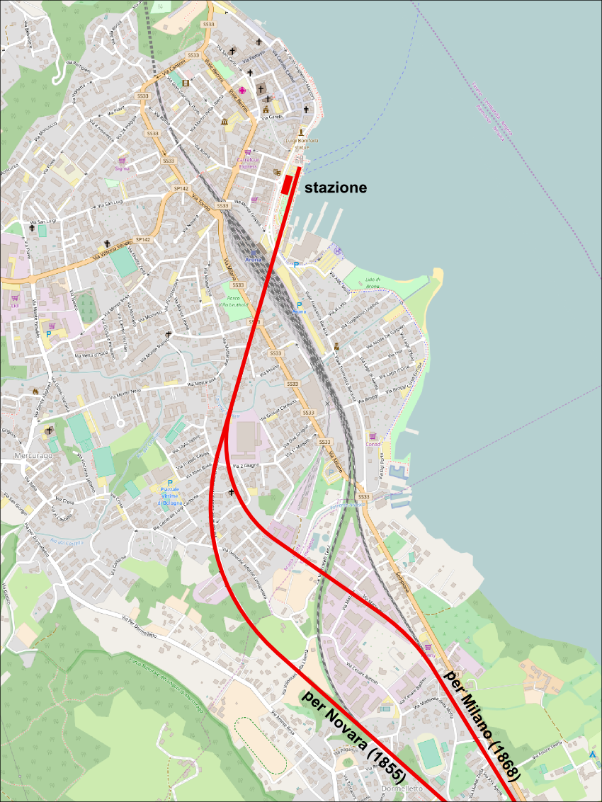 Mappa dei vecchi tracciati ferroviari ad Arona, prima dell’apertura della ferrovia del Sempione nel 1905. This map may be incomplete, and may contain errors. Don't rely solely on it for navigation.